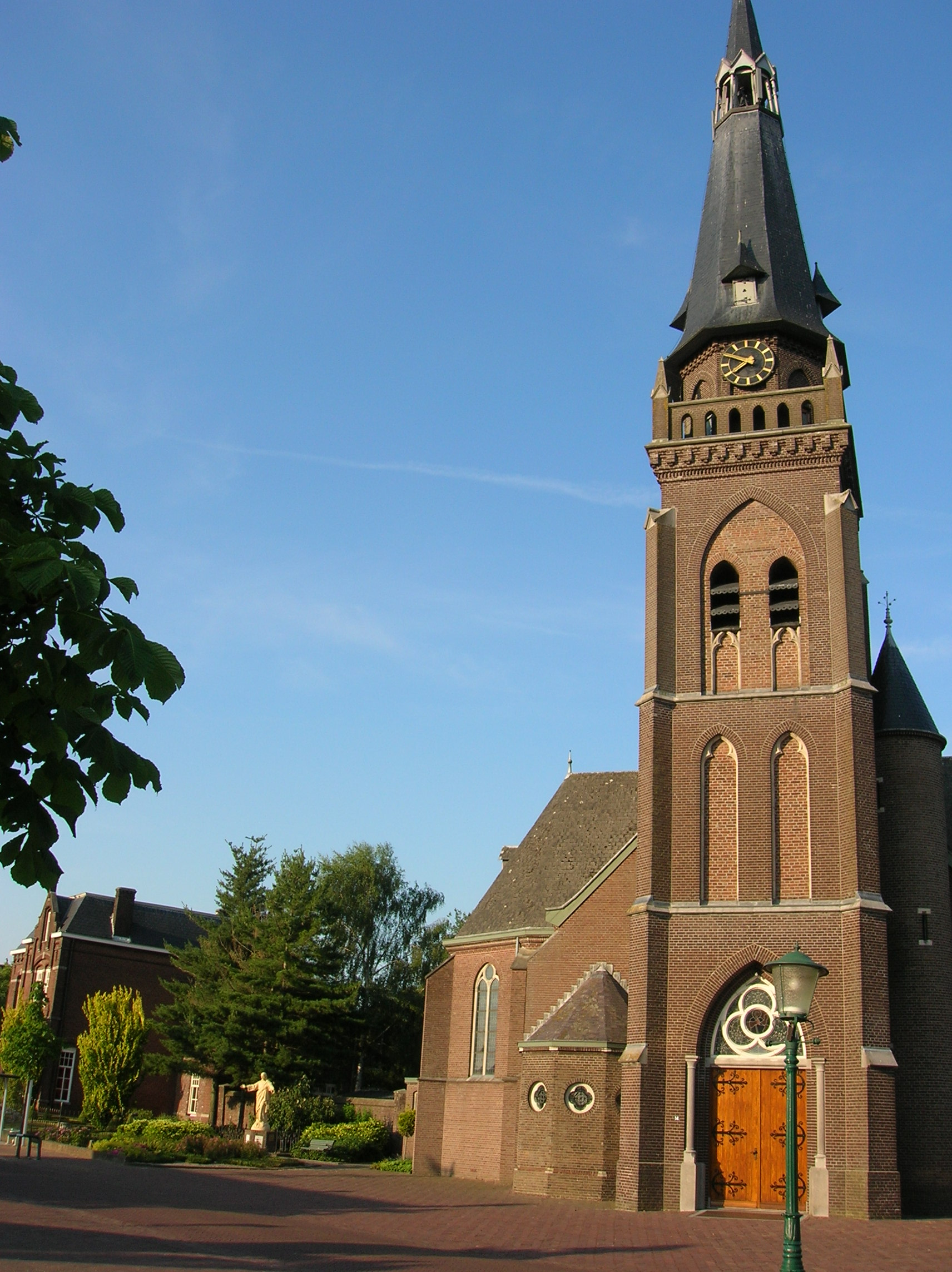 Zelfgemaakte foto